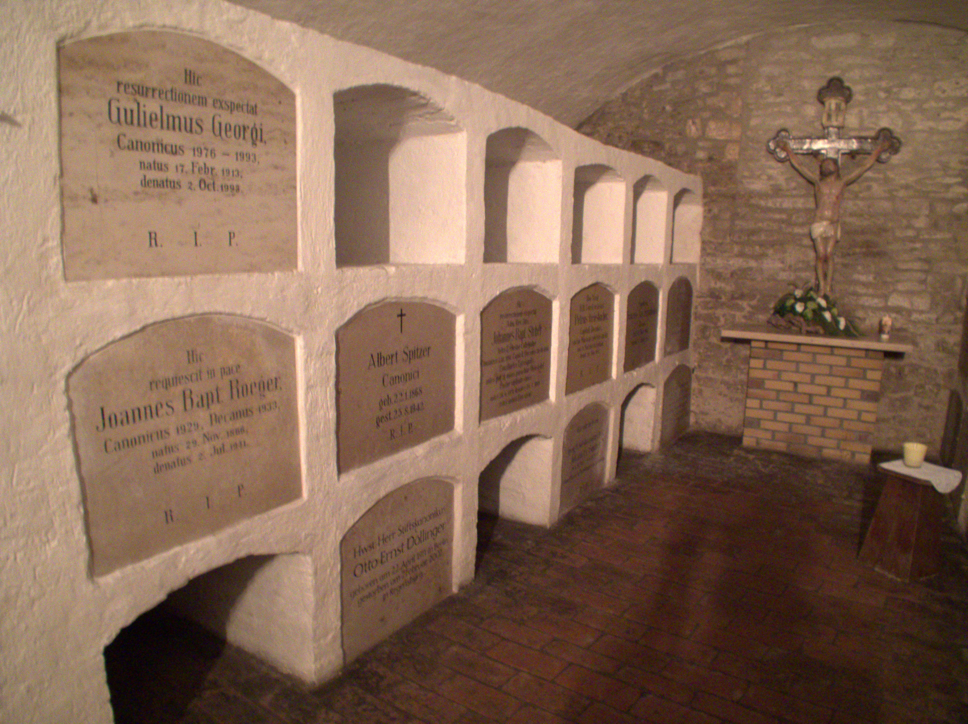 Stiftskirche St Johann in Regensburg am Krauterermarkt 5: Krypta